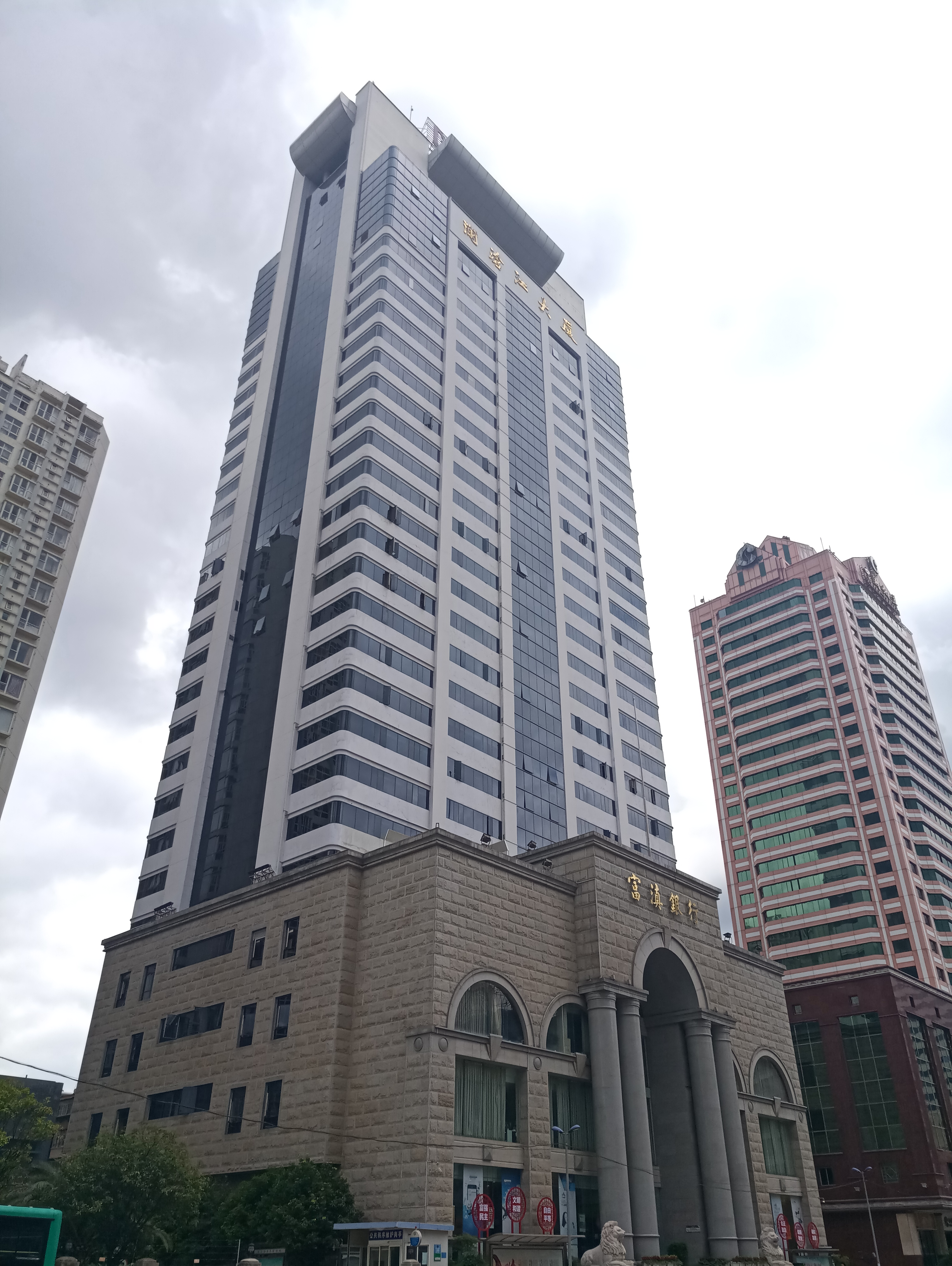 中文（中国大陆）: 富滇银行总行澜沧江大厦